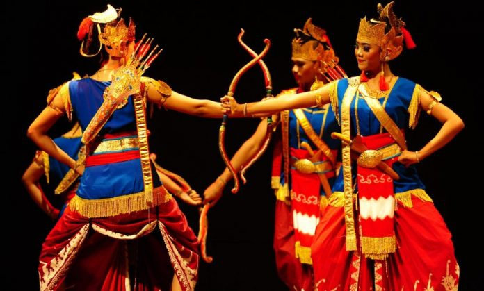 Tari Jurit Ampil Kridha Warastra merupakan tarian dari Kota Salatiga yang menceritakan tentang Perjanjian Salatiga pada tanggal 17 Maret 1757.